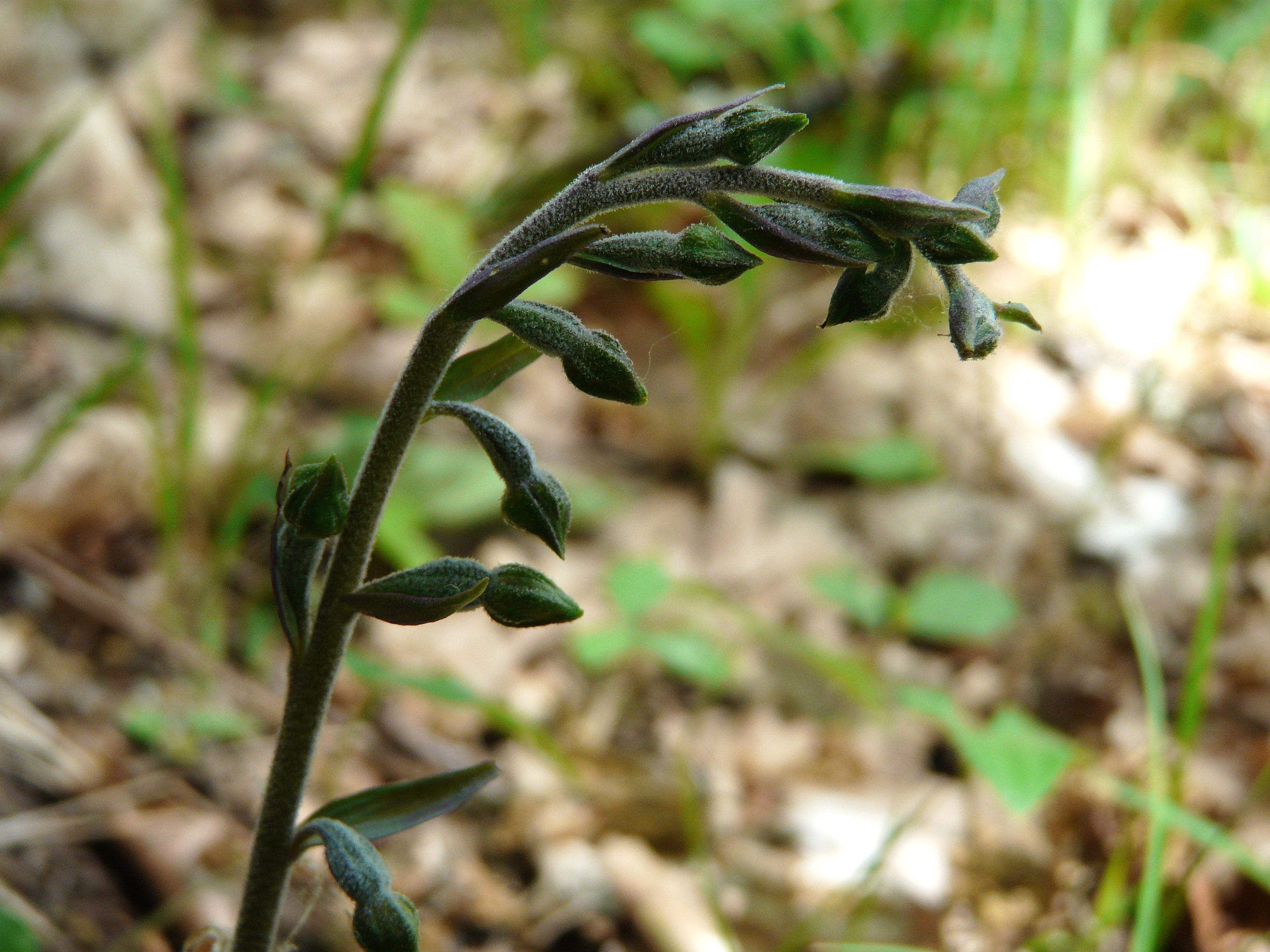 Boutons d'épipactis à petites feuilles (Epipactis microphylla), Trélissac, Dordogne, France.